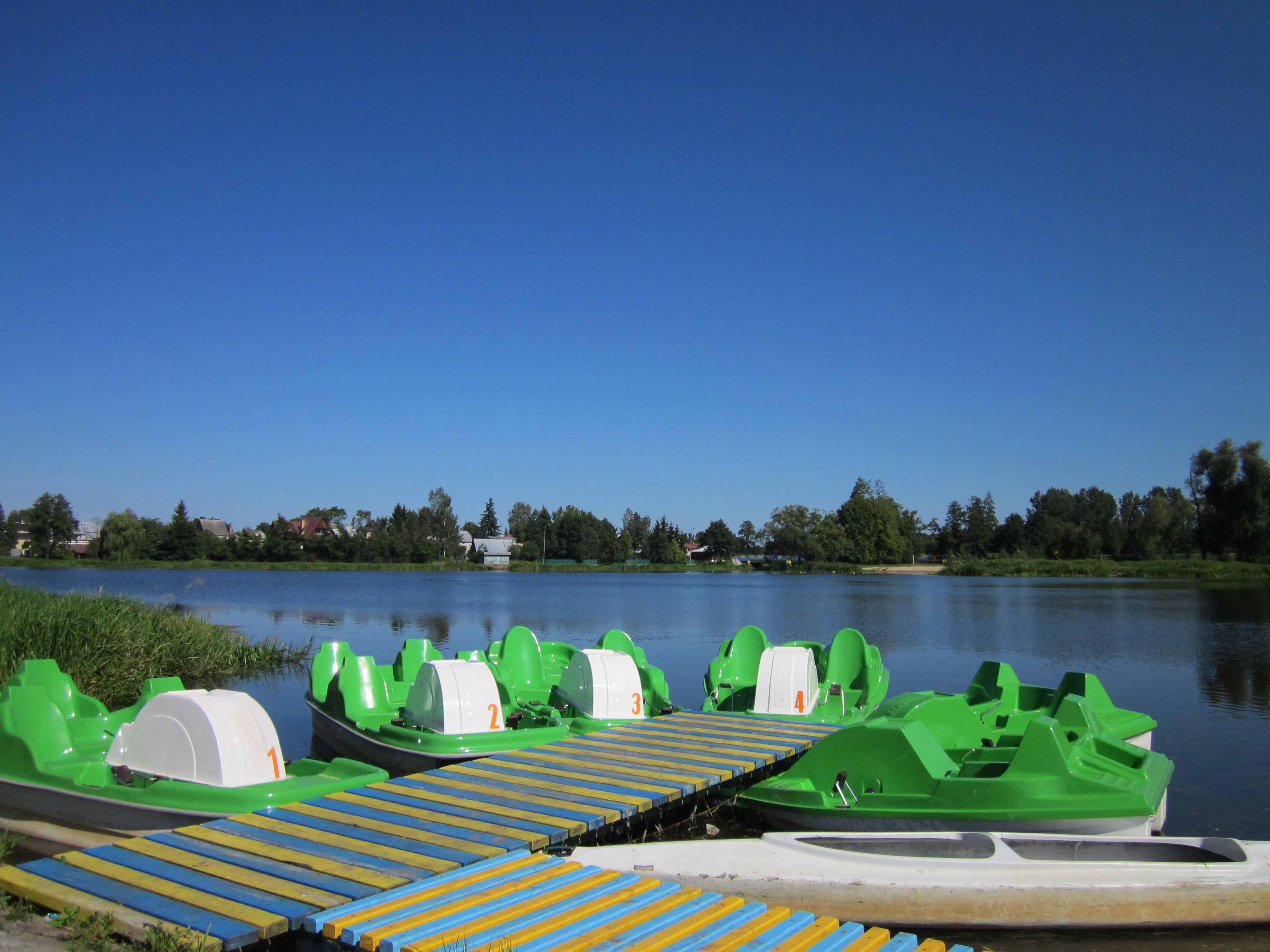 Jest to widok od ul. Stadion. W Ciechanowcu istnieje możliwość wypożyczenia sprzętu wodnego – na fotografii widoczne rowery wodne i kajak.